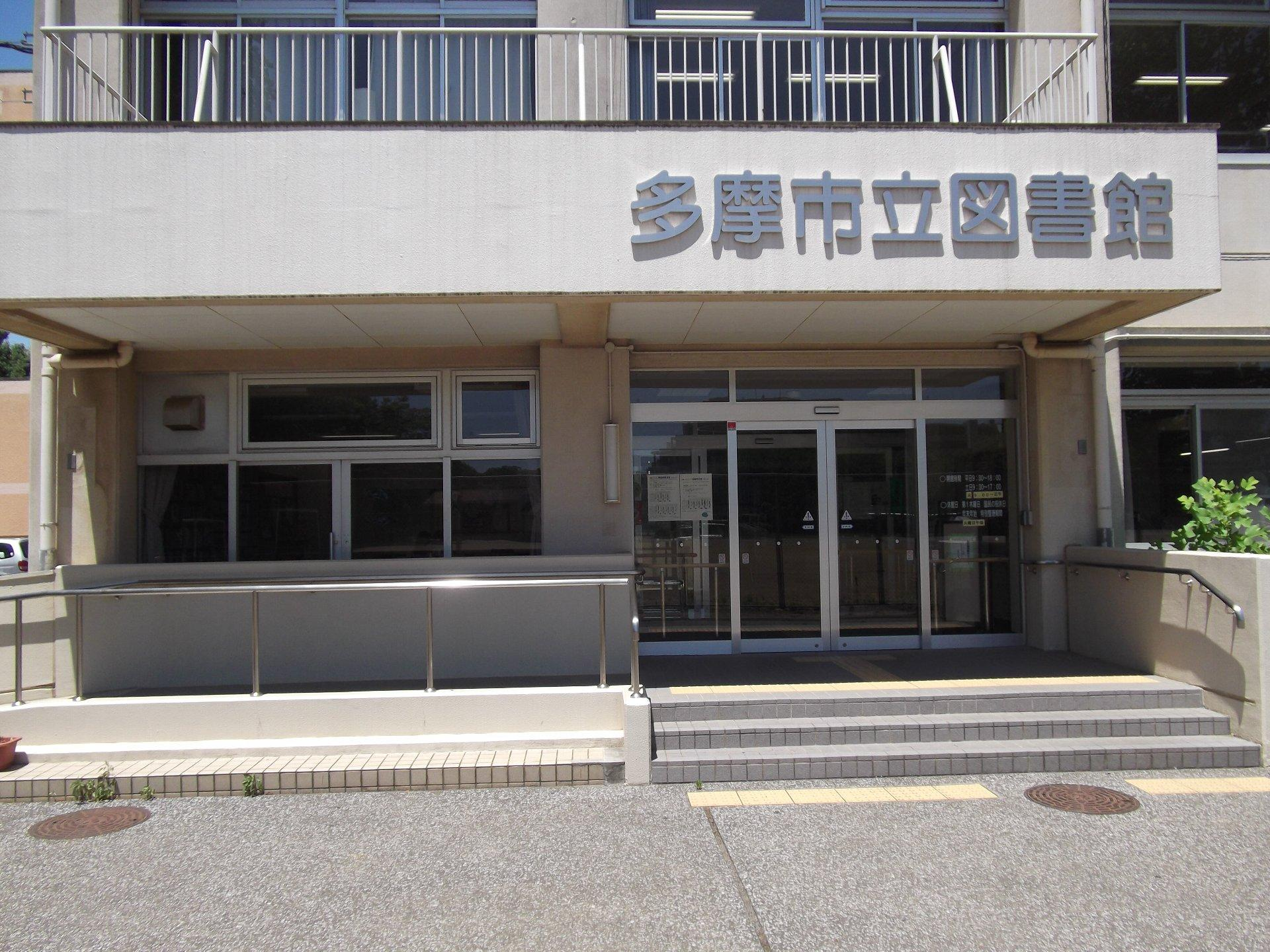 多摩市立図書館本館（旧西落合中学校跡地）